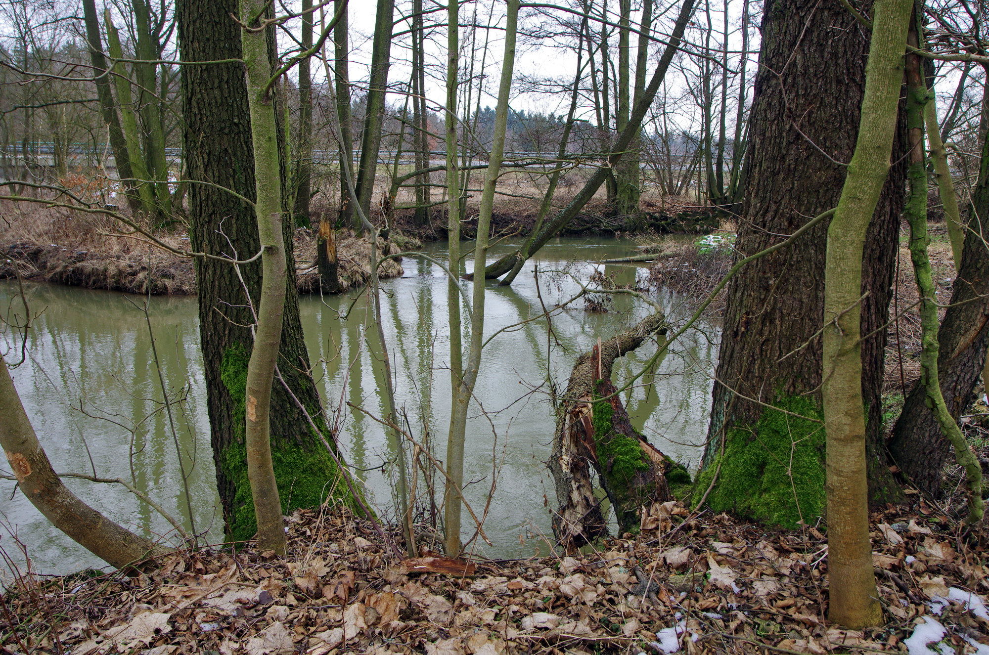 říčka Plesná v místě Hartoušovských mofet - významného krajinného prvku, okres Cheb